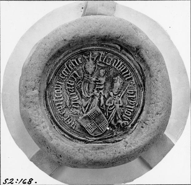 Sigill, Brynolf Gerlachsson, biskop i Skara, R.A. pergament, efter gipsavgjutning. Kategori: (11) Diverse Sigill, Brynolf Gerlachsson, biskop i Skara, R.A. pergament, efter gipsavgjutning.